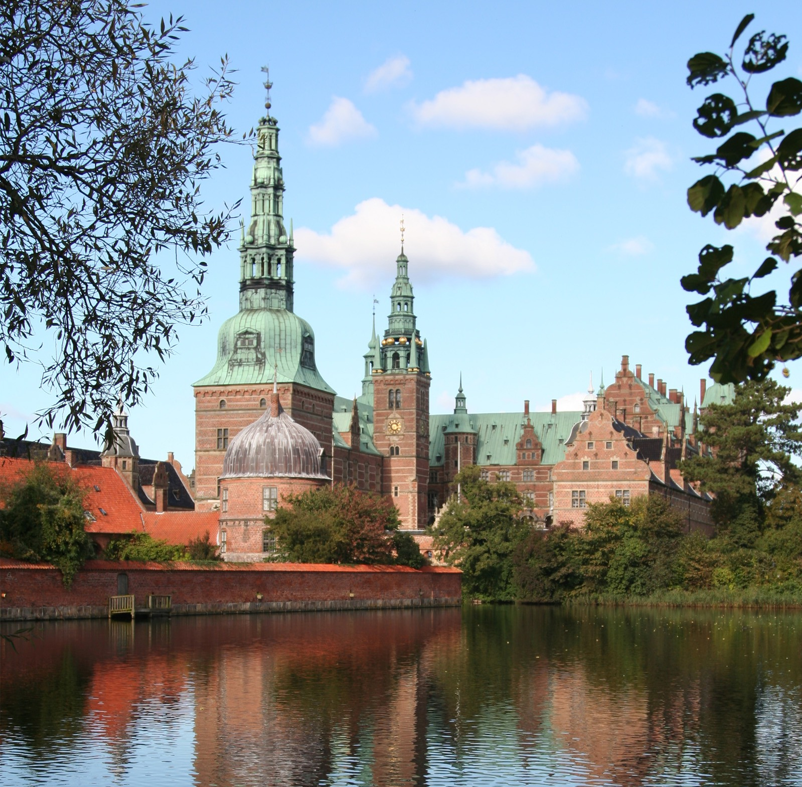 Frederiksborg Castle, Denmark